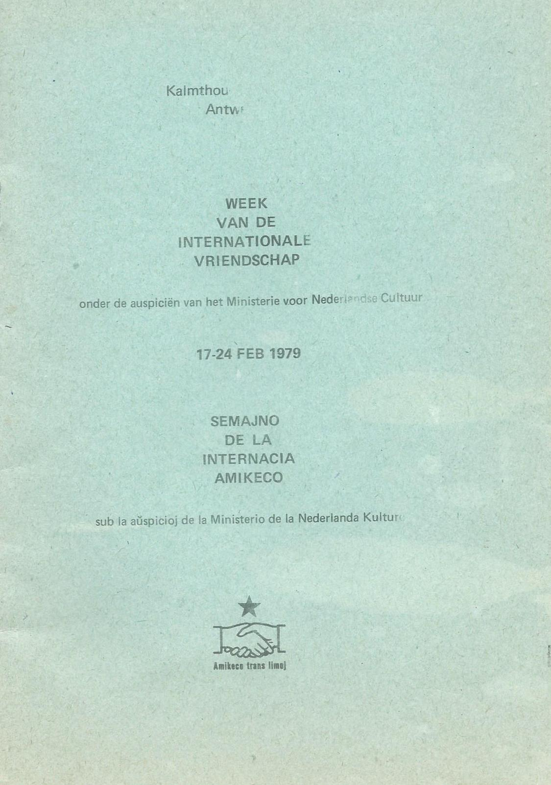 kovrilo de "Semajno de la Internacia Amikeco", 1979